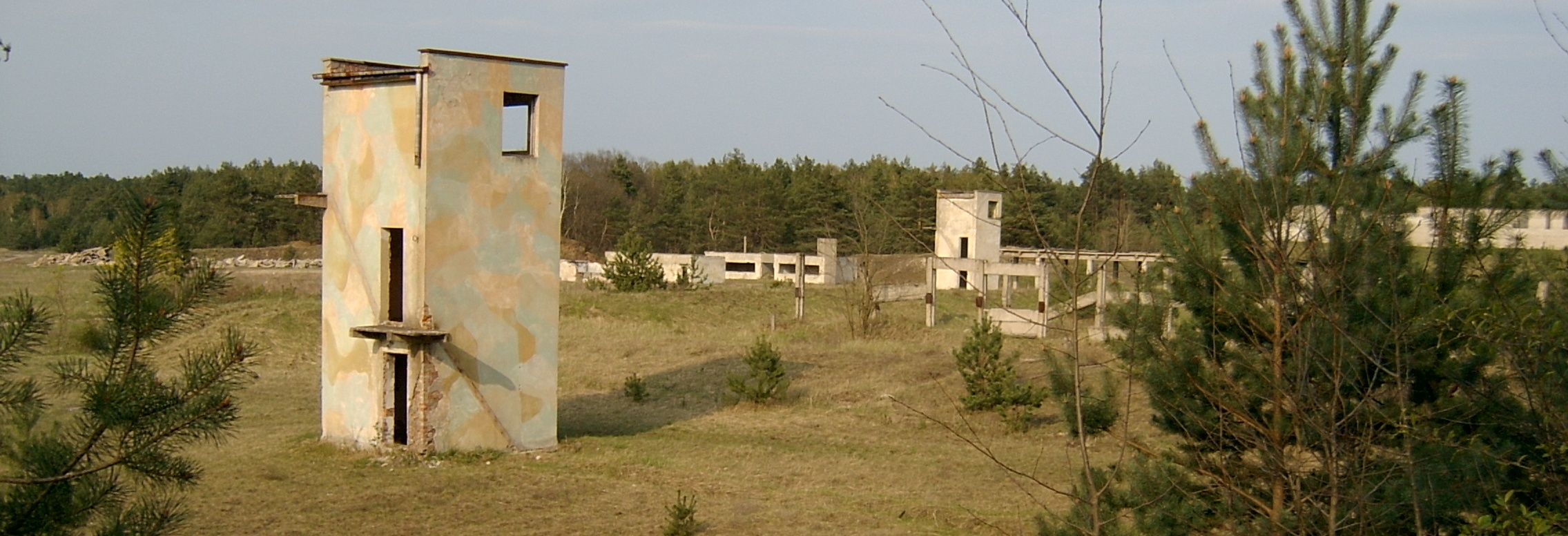 Słubice, dawny teren wojskowy